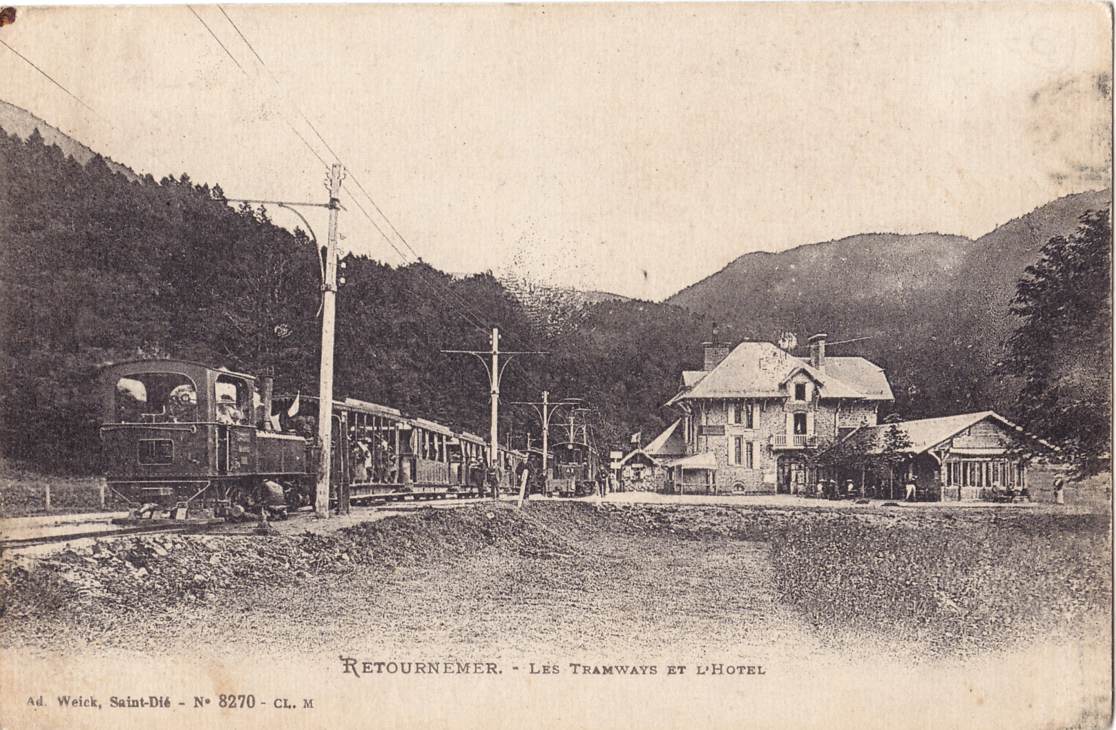 Carte postale ancienne éditée par Adolphe Weick, n°8270 : RETOURNEMER - Les Tramways et l'Hotel